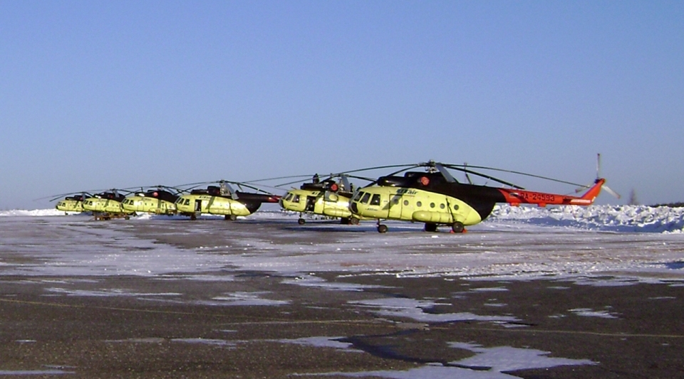 Стоянка на перроне аэропорта Усть-Кут вертолетов Ми-8